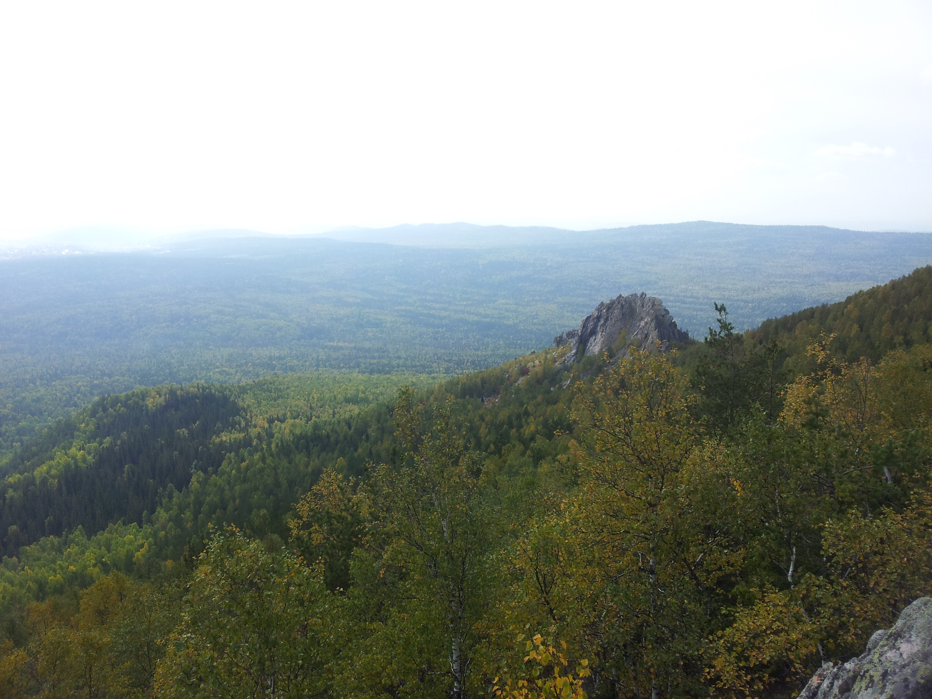 Blick vom Südgipfel des Dwuglawaja Sopka nach Westen im Nationalpark Taganai